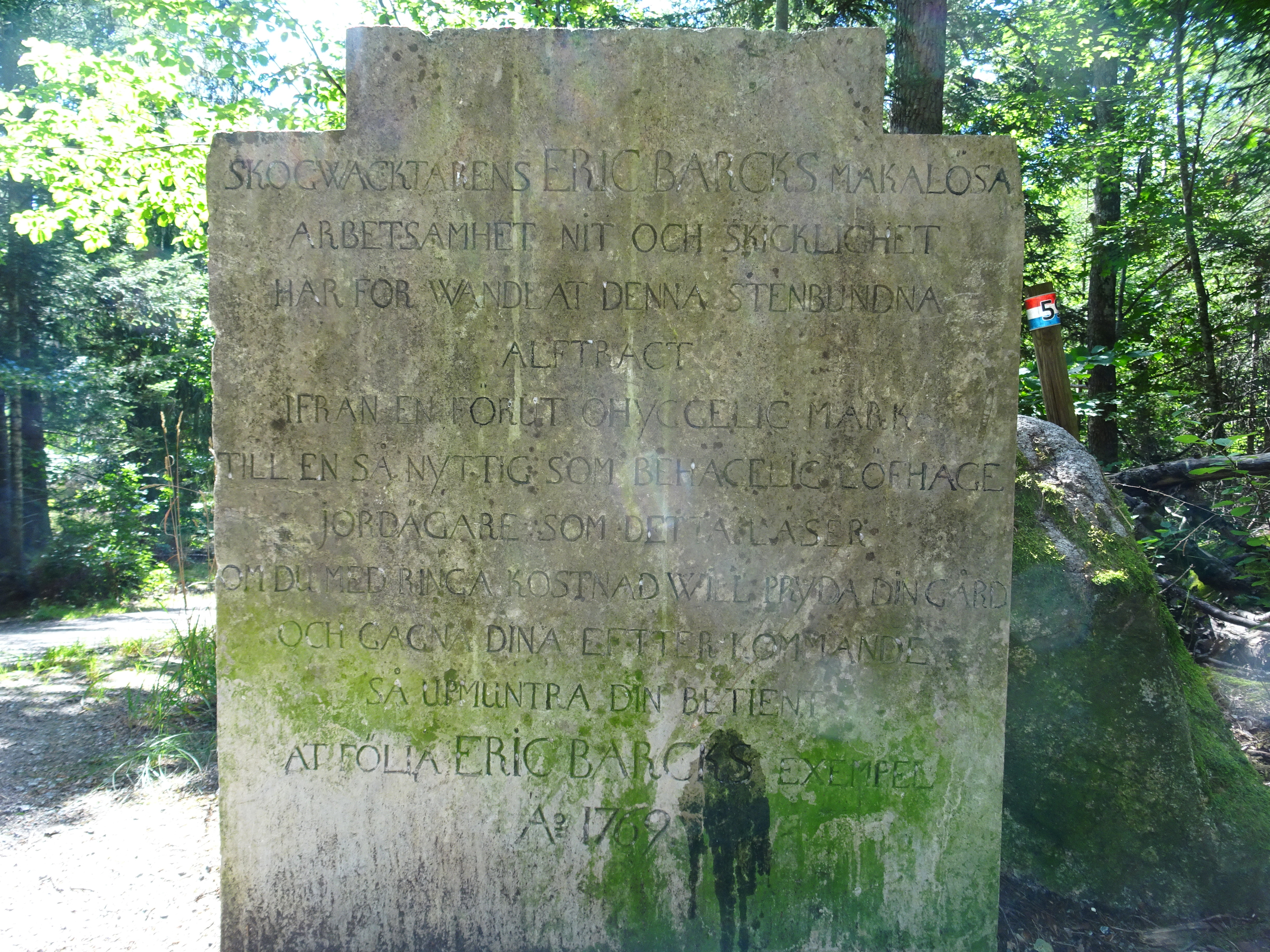 Minnessten (RAÄ-nummer: Västra Ryd 34:19) i Granhammars engelska trädgård: SKOGWACKTARENS ERIC BARCKS MAKALÖSA ARBETSAMHET NIT OCH SKICKLIGHET HAR FÖR WANDLAT DENNA STENBUNDNA ALFTRACT IFRÅN EN FÖRUT OHYGGELIG MARK TILL EN SÅ NYTTIG SOM BEHAGELIG LÖFHAGE JORDÄGARE SOM DETTA LÄSER OM DU MED RINGA KOSTNAD WILL PRYDA DIN GÅRD OCH GAGNA DINA EFTERKOMMANDE SÅ UPPMUNTRA DIN BETIENT AT FÖLIA ERIC BARCKS EXEMPEL AO 1769